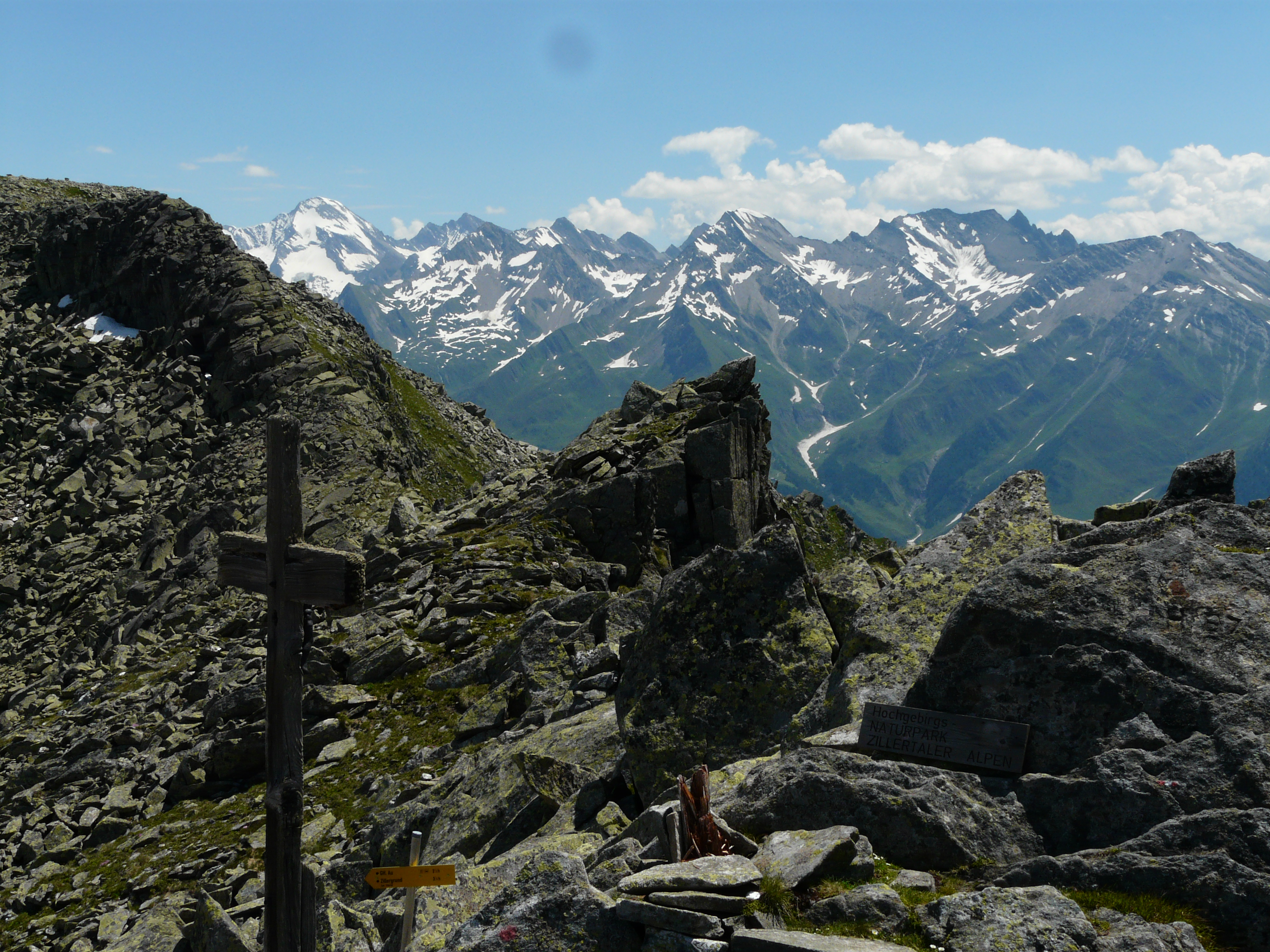 Hörndljoch: Links die Rötspitze